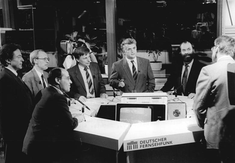 ADN-Settnik 7.5.90 Berlin: Kommunalwahl - Wahlparty - Kurz vor 22.00 Uhr gaben Parteivorsitzende im Wahlstudio des Deutschen Fernsehfunks im Palast der Republik erste Statements zum Wahlverlauf und zu ersten Wahlergebnissen. Vorn: Gregor Gysi (PDS), links: Dr. Peter Michael Diestel (DSU), daneben: Lothar de Maiziere (CDU), Prof. Dr. Rainer Ortleb (LDP), Bernhard Büchel (Moderator), Markus Meckel (SPD), rechts: Bruno Menzel (FDP).